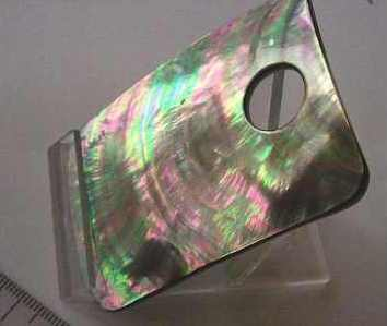 masa perłowa, autor zdjęcia Ewa Jastrzębska 10.07.2006r.